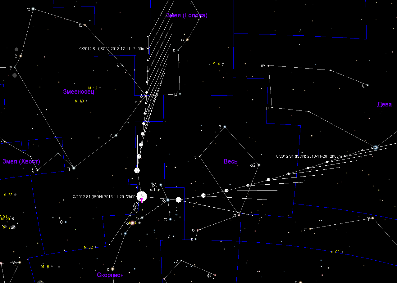 Карта пути кометы C/2012 S1 около перигелия своей орбиты (19 ноября - 12 декабря 2013 года) с шагом в сутки. Изображение создано при помощи программы Cartes du Ciel.